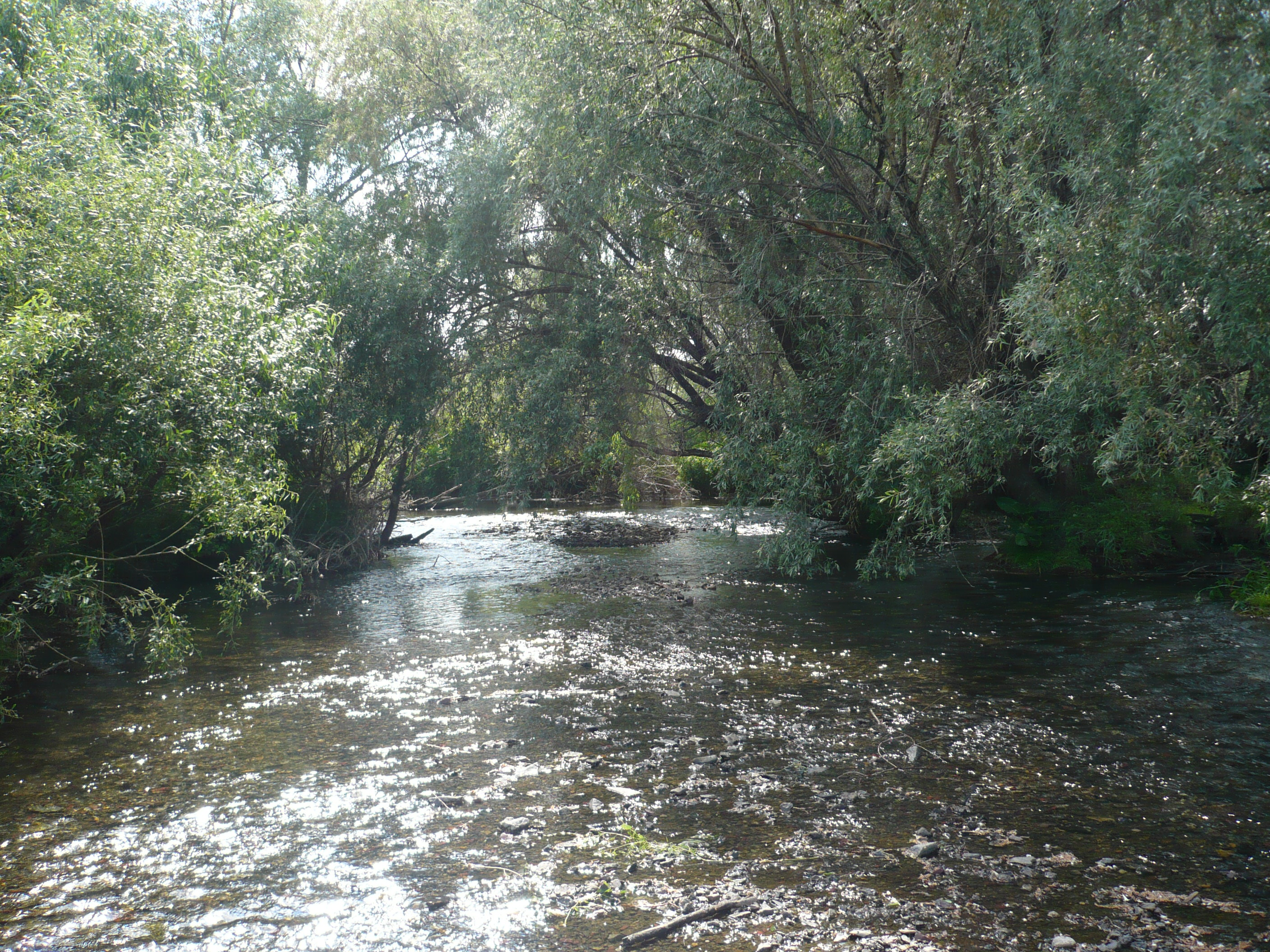 Река Худолаз в Баймакском районе.